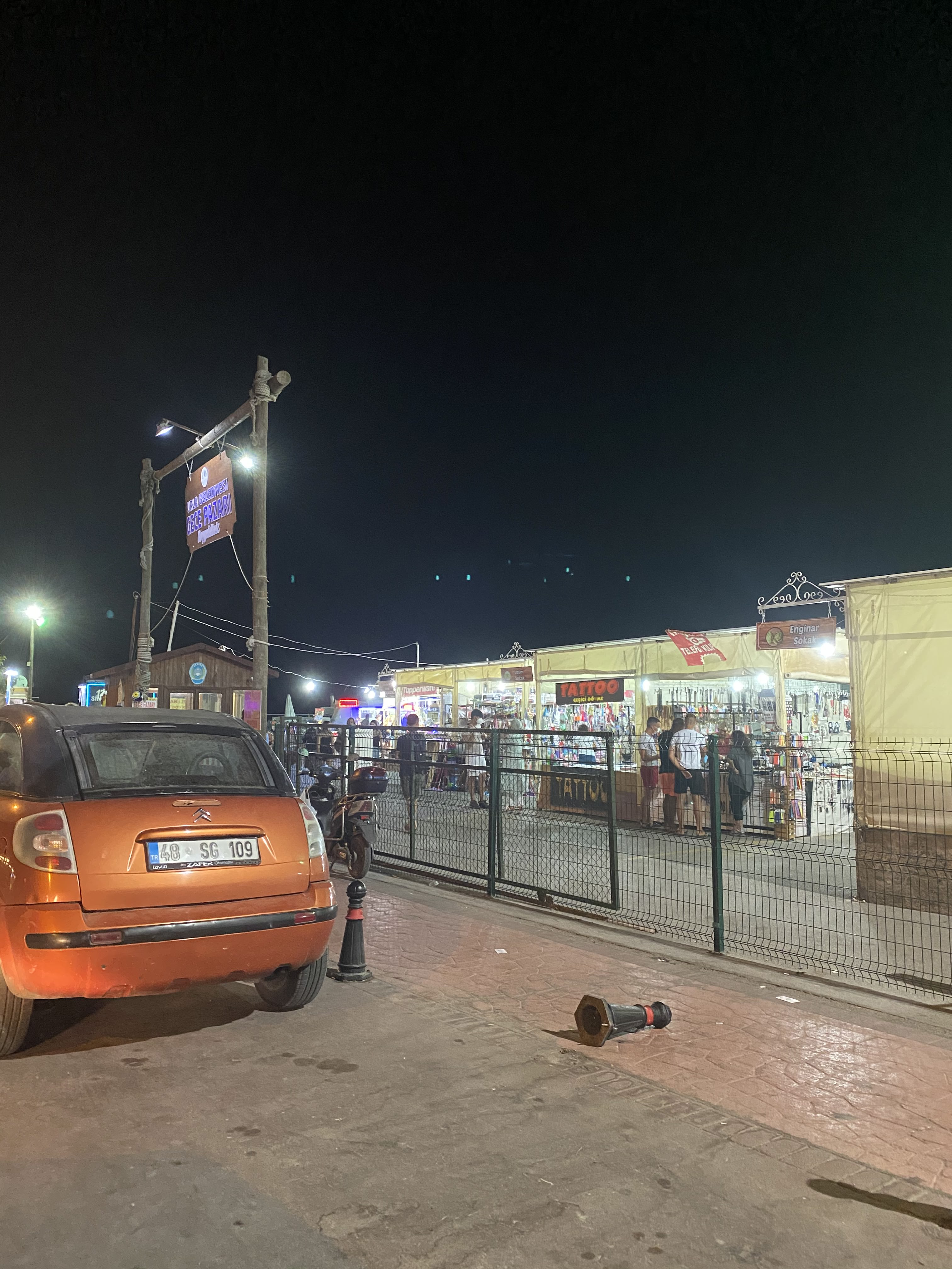 Cesmealti Urla